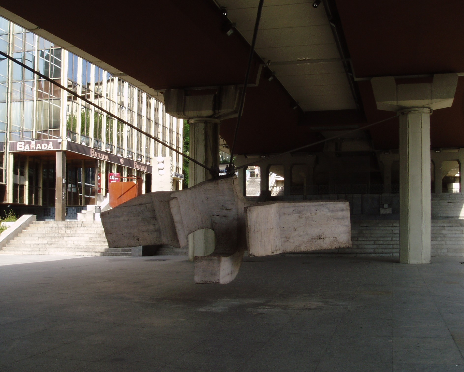 La Sirena varada de Eduardo Chillida